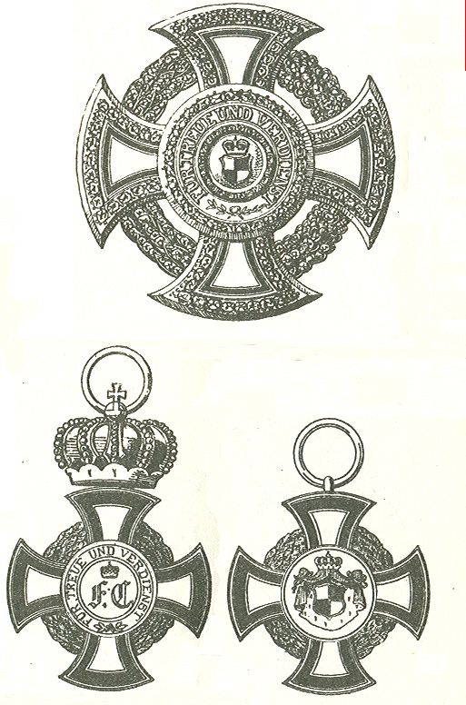 Scan van Blz. 158 en 159 van het boek "Handbuch der Ritter- und Verdienstorden " uitgegeven 1893 door Weber.Tekening van de in 1902 overleden Maximilian Gritzner. Robert Prummel 10 jul 2008 16:40 (CEST)